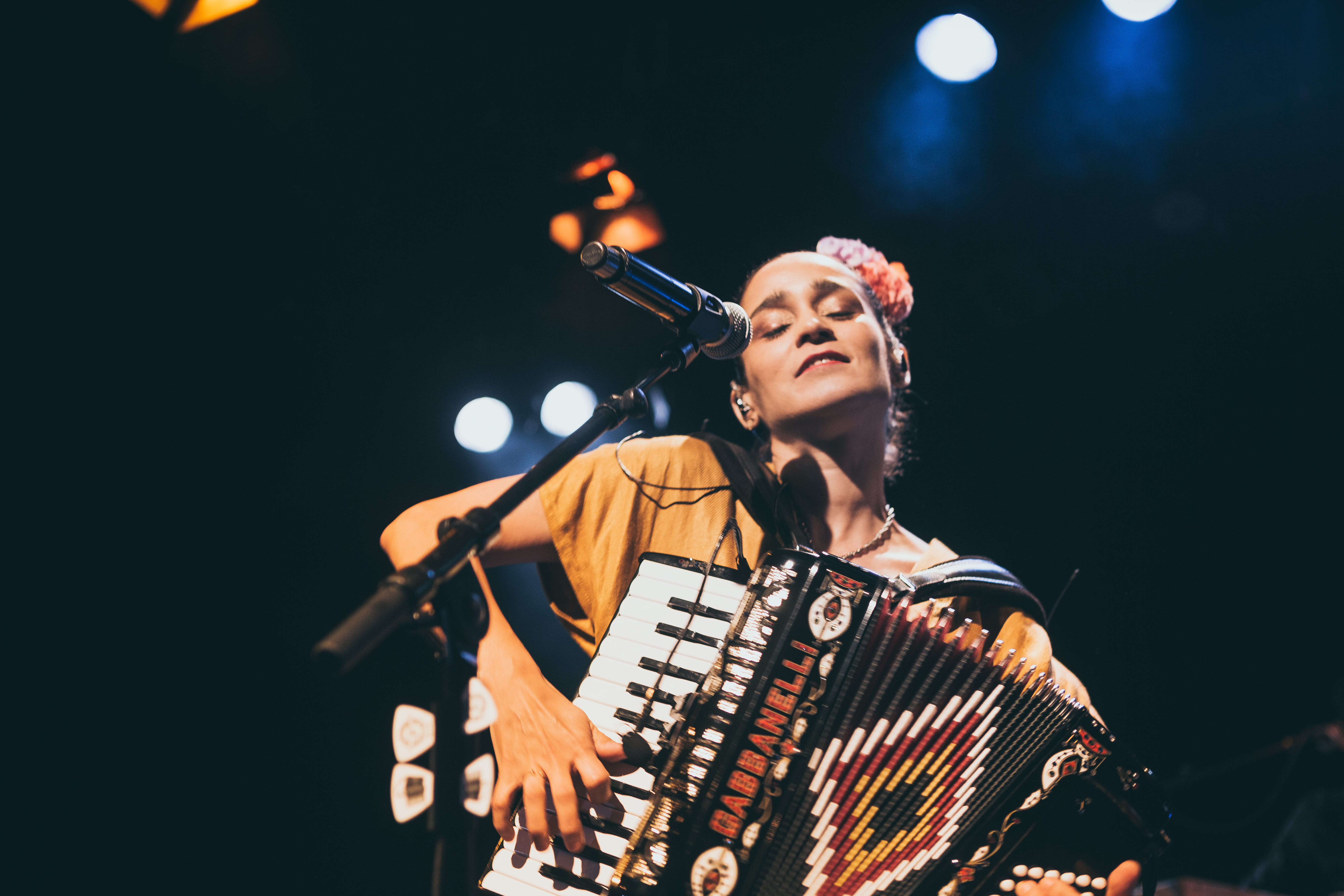 Julieta Venegas soinua jotzen Dkluba zirkuituaren baitan emandako kontzertuan. Intxaurrondo K.E.